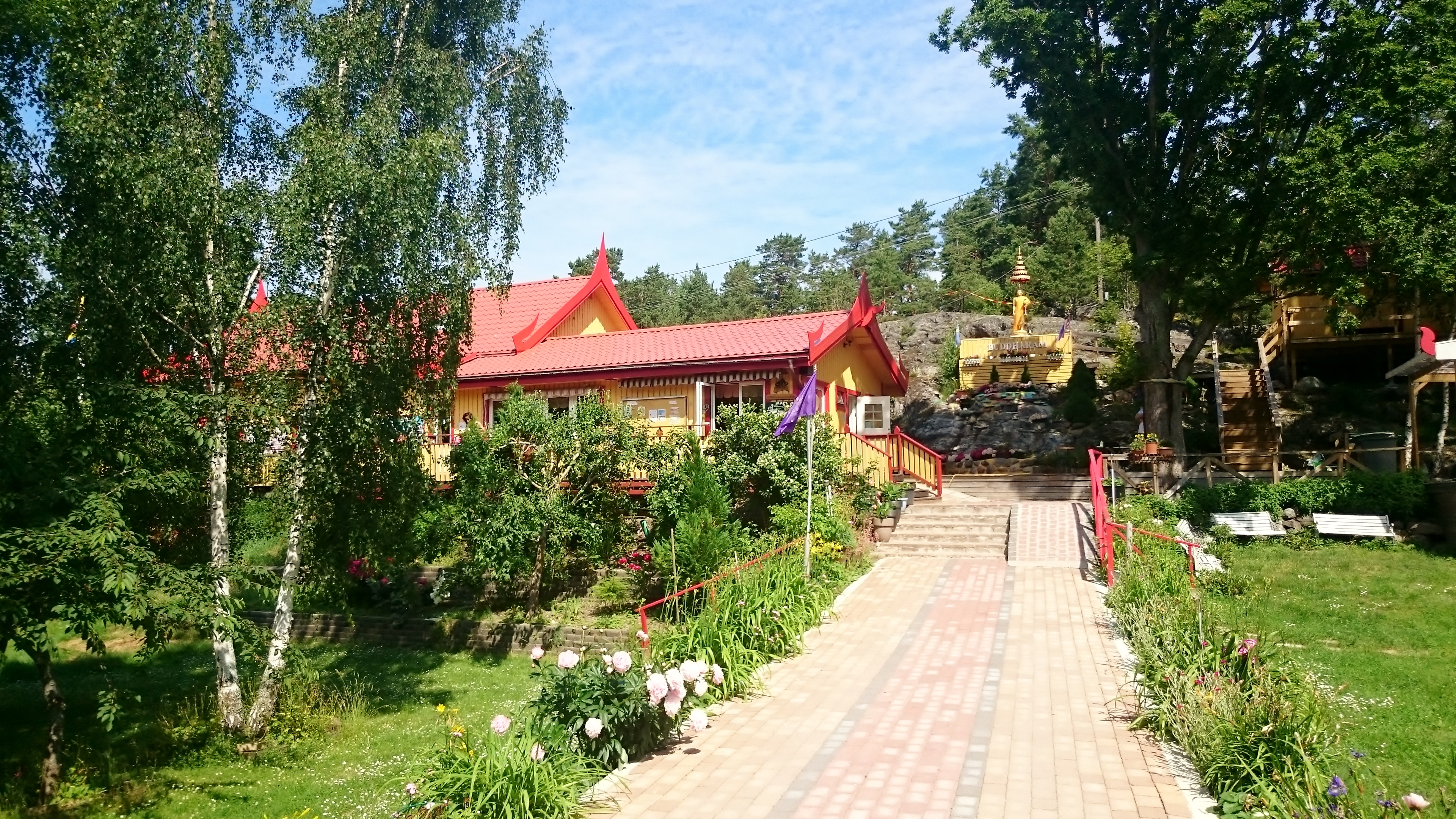 Buddhistiskt tempel i Torsby, Värmdö kommun.